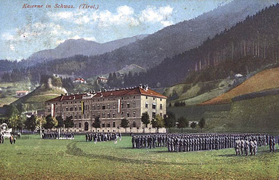 Infanteriekaserne in Schwaz